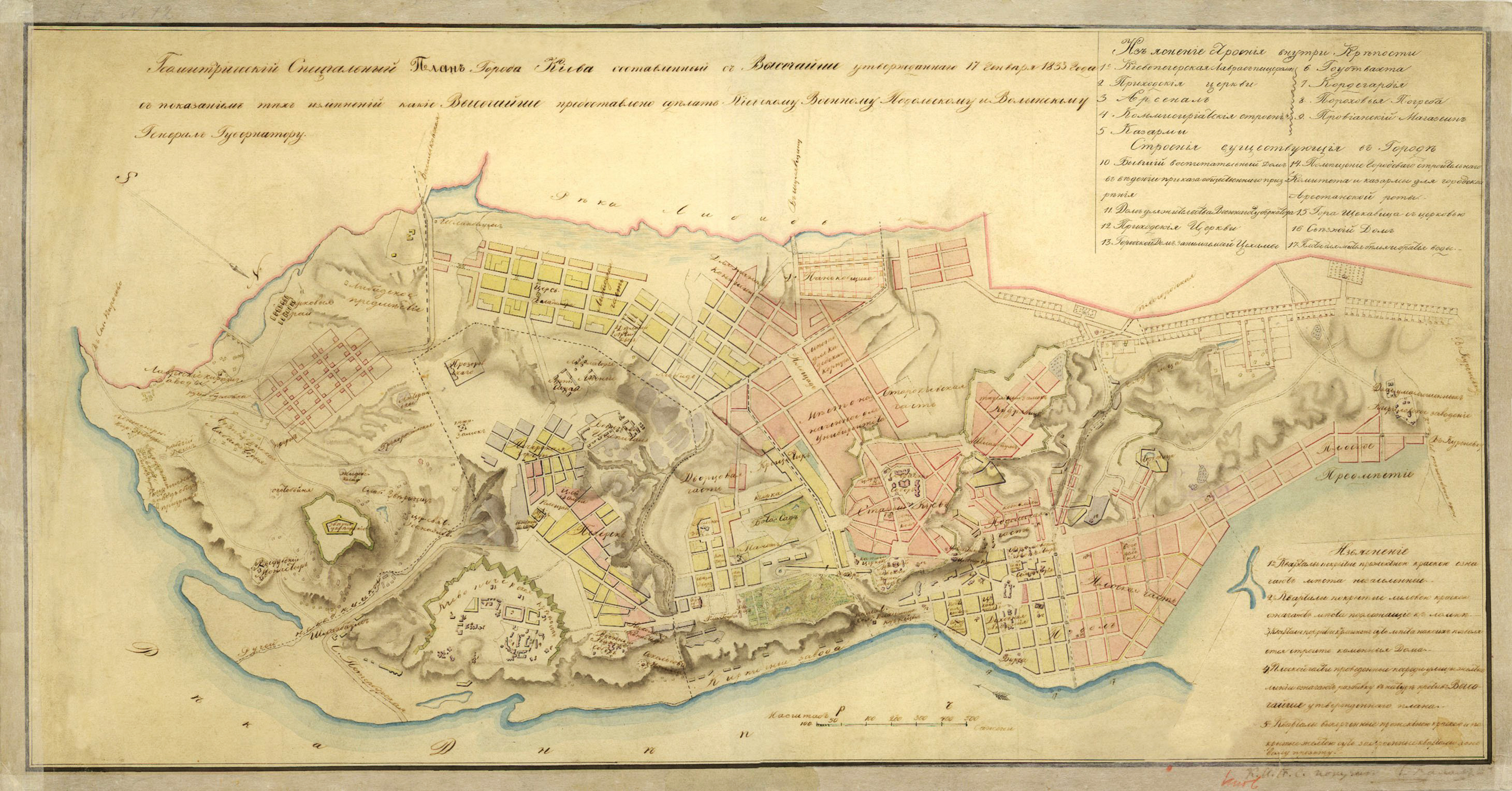 Геометричний спеціальний план міста Києва, складений із затвердженого 17 січня 1833 року з указівкою тих змін, які надано зробити Київському Військовому Подільському і Волинському генералу губернатору